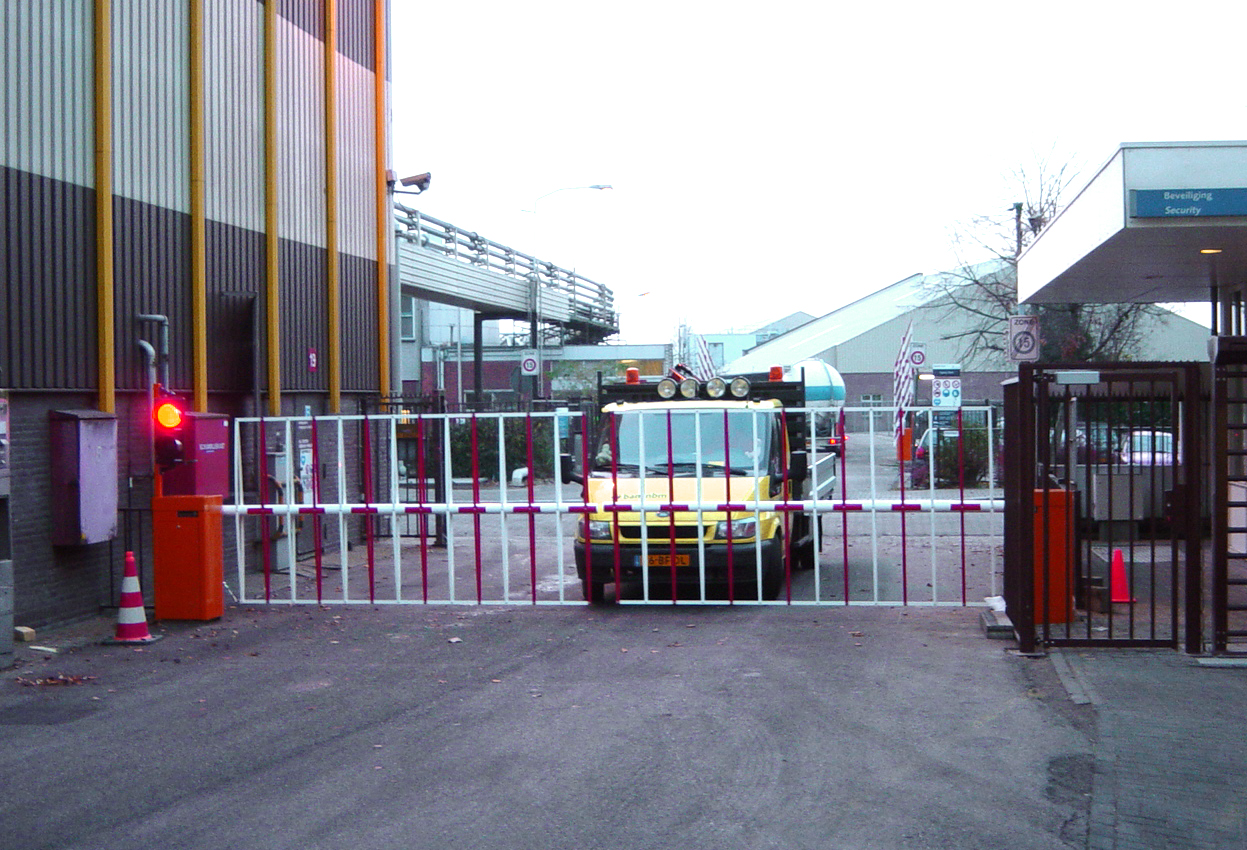 Slagbomen met vouwhekken